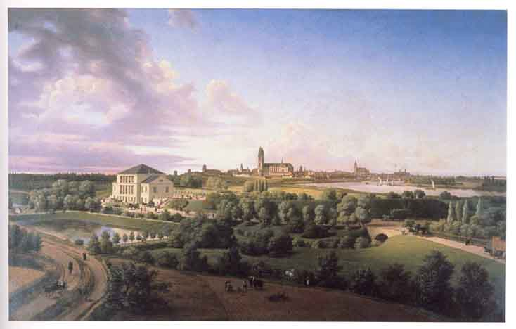 Stadtansicht der Stadt Magdeburg von Südosten, im Vordergrund Friedrich-Wilhelms-Garten (Klosterbergegarten)